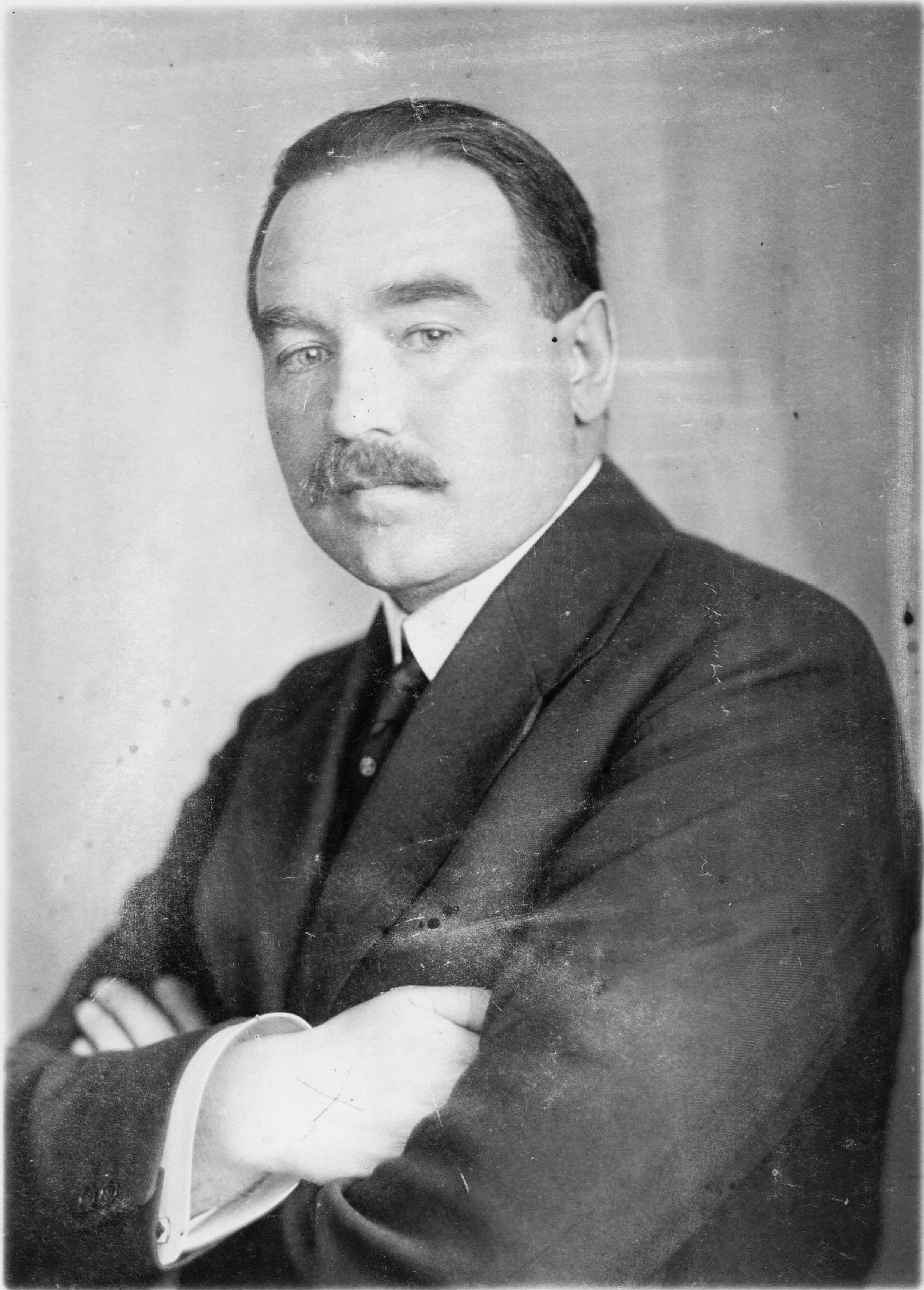 Aleksandr Gavrilovic Sljapnikov (1885-1937)